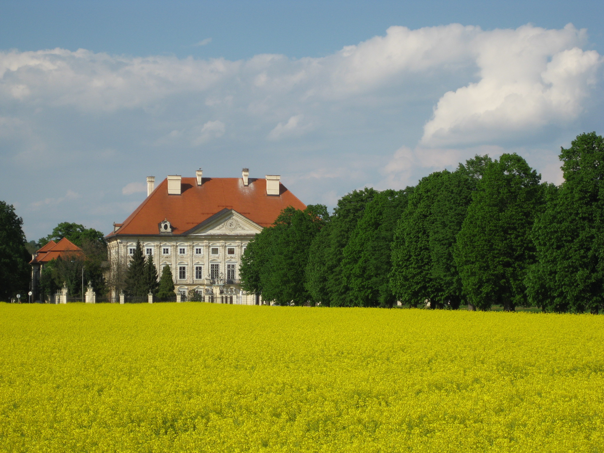 Dornava mansion near Ptuj, Slovenia